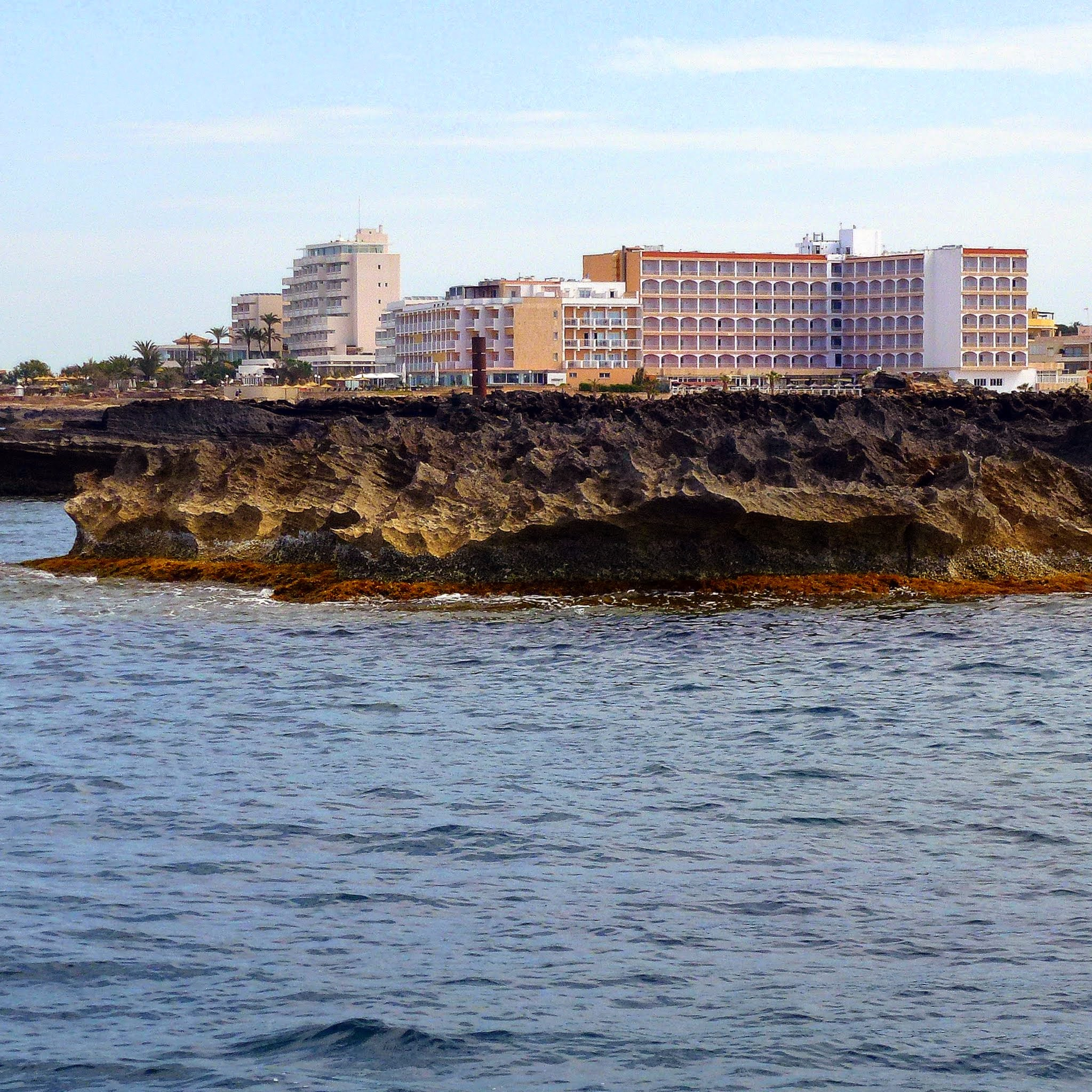 Colònia de Sant Jordi, Mallorca, Islas Baleares, España